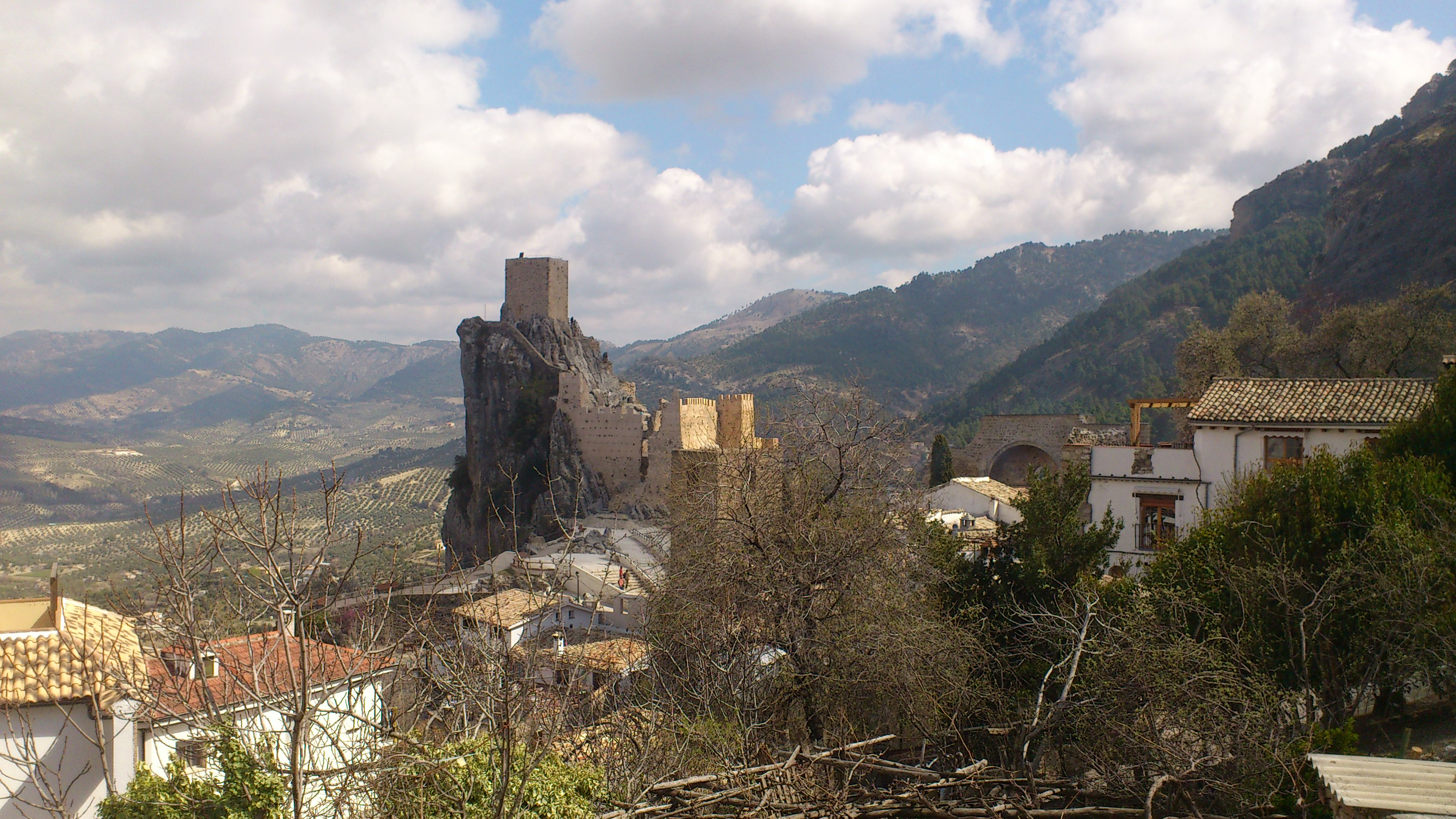 Castillo en La Iruela, Jaén